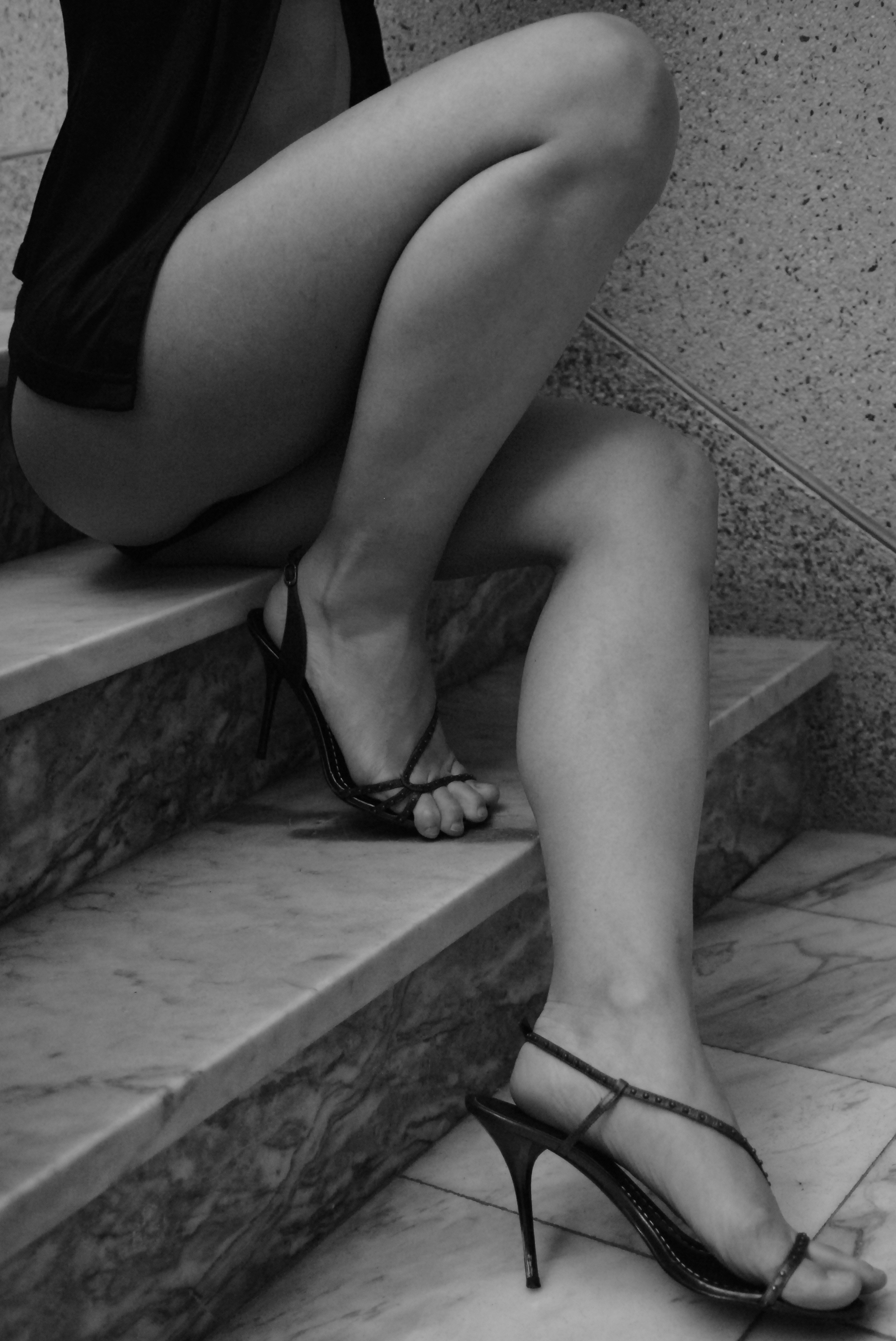 Female legs